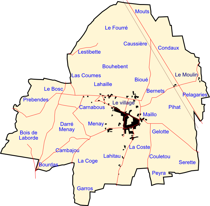 Carte des quartiers de la commune de Sombrun, Hautes-Pyrénées, France